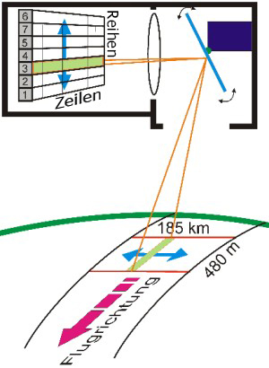 Grafik des optomechanischen TM-Abtasters